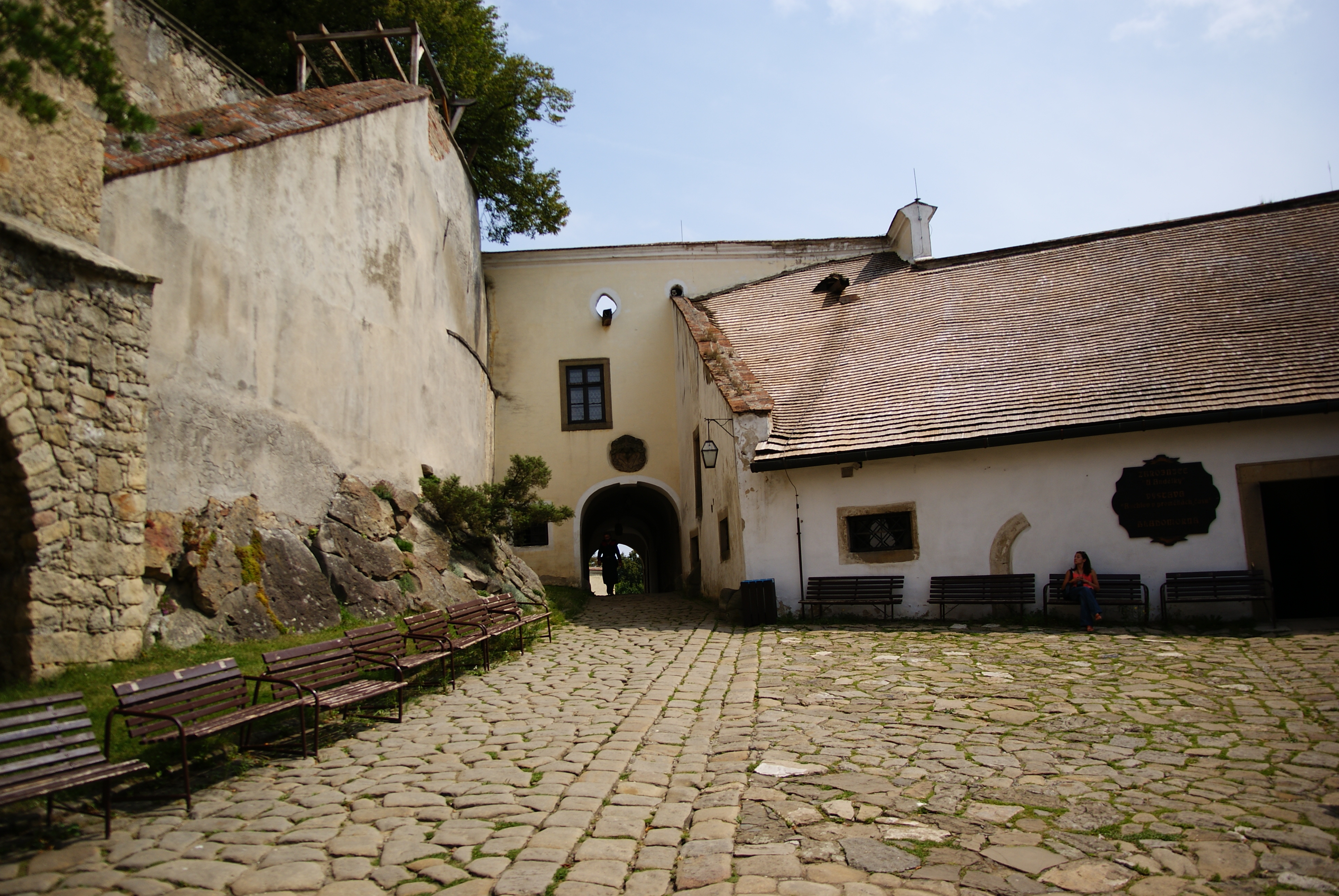 Hrad Buchlov (Chrastě), SZ od města 418, Chrastě